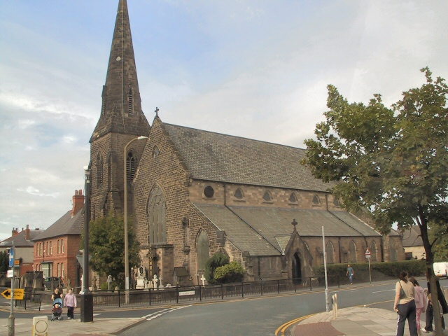 St.Albans Church, Liscard